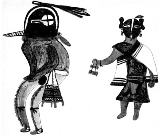 Kokopelli on left and Kokopelli Mana on right. Hopi artwork.